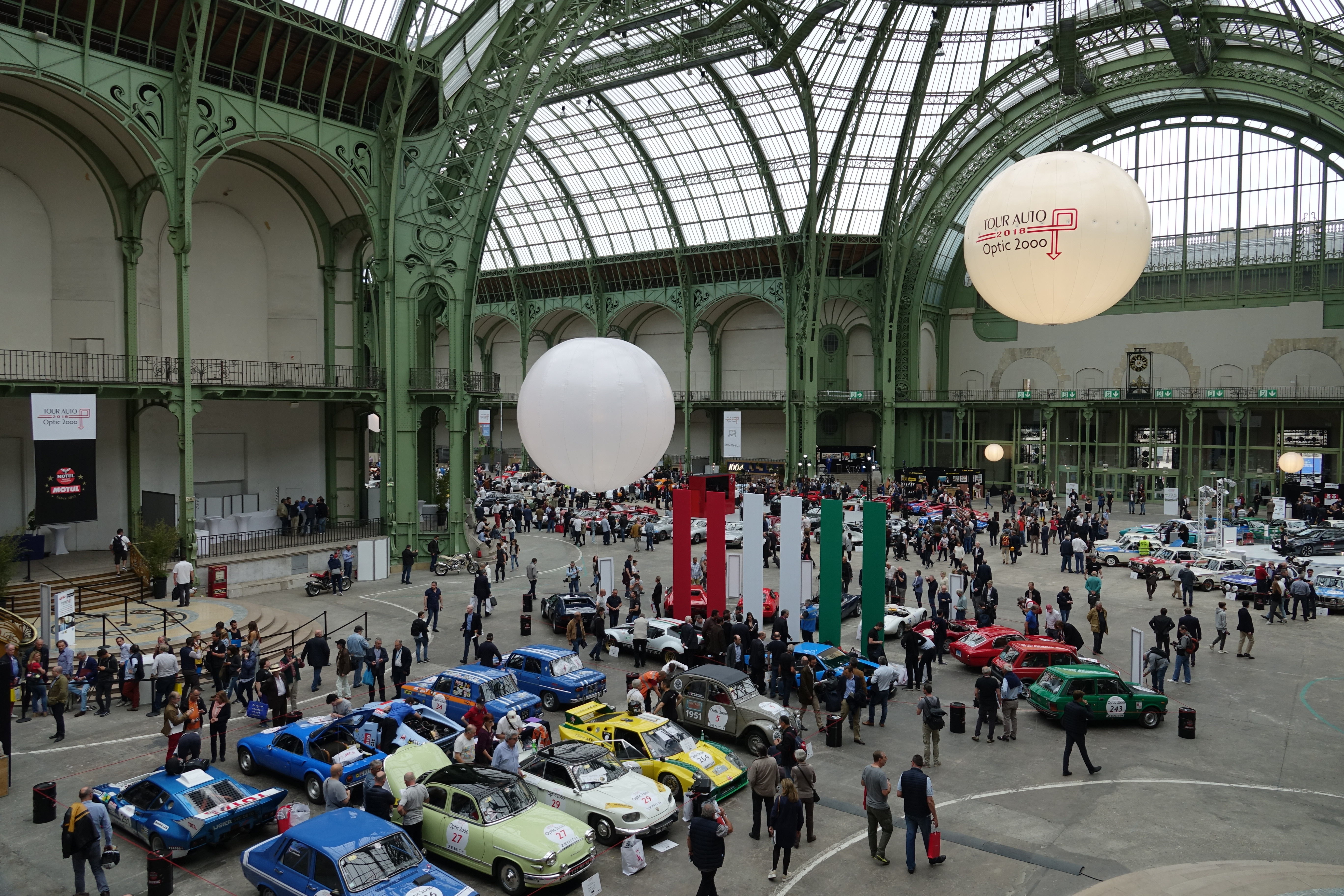 Tour Auto Optic 2000 - Grand Palais